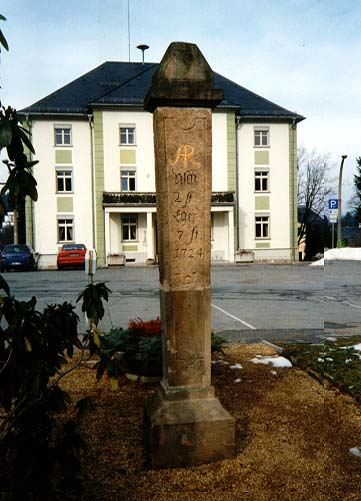 Halbmeilensäule in Bad Elster Fotograf: Hejkal